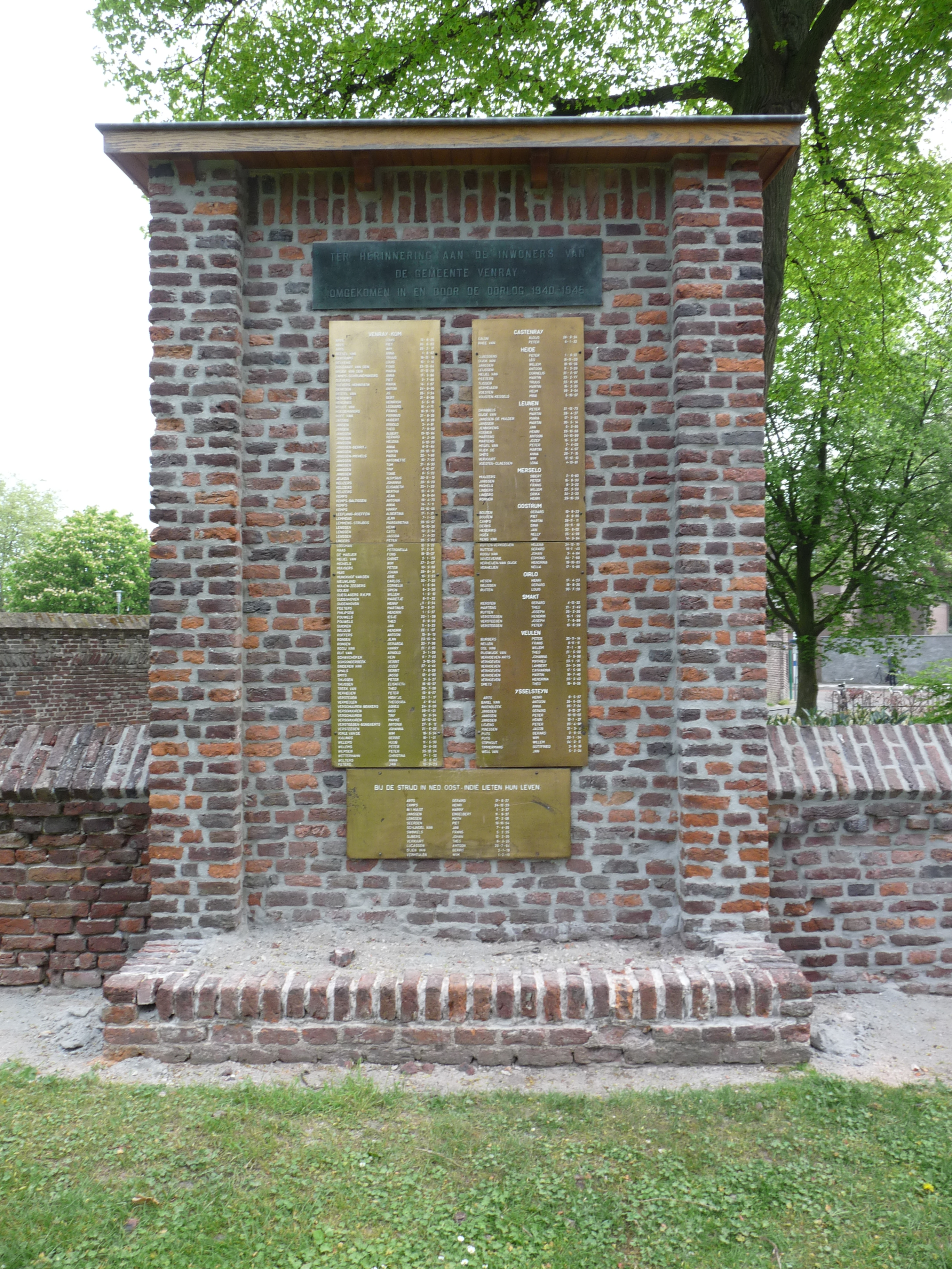 Oorlogsmonument Venray gelegen bij de ingang van het voormalig kerkhof naast de St.PetrusBandenkerk